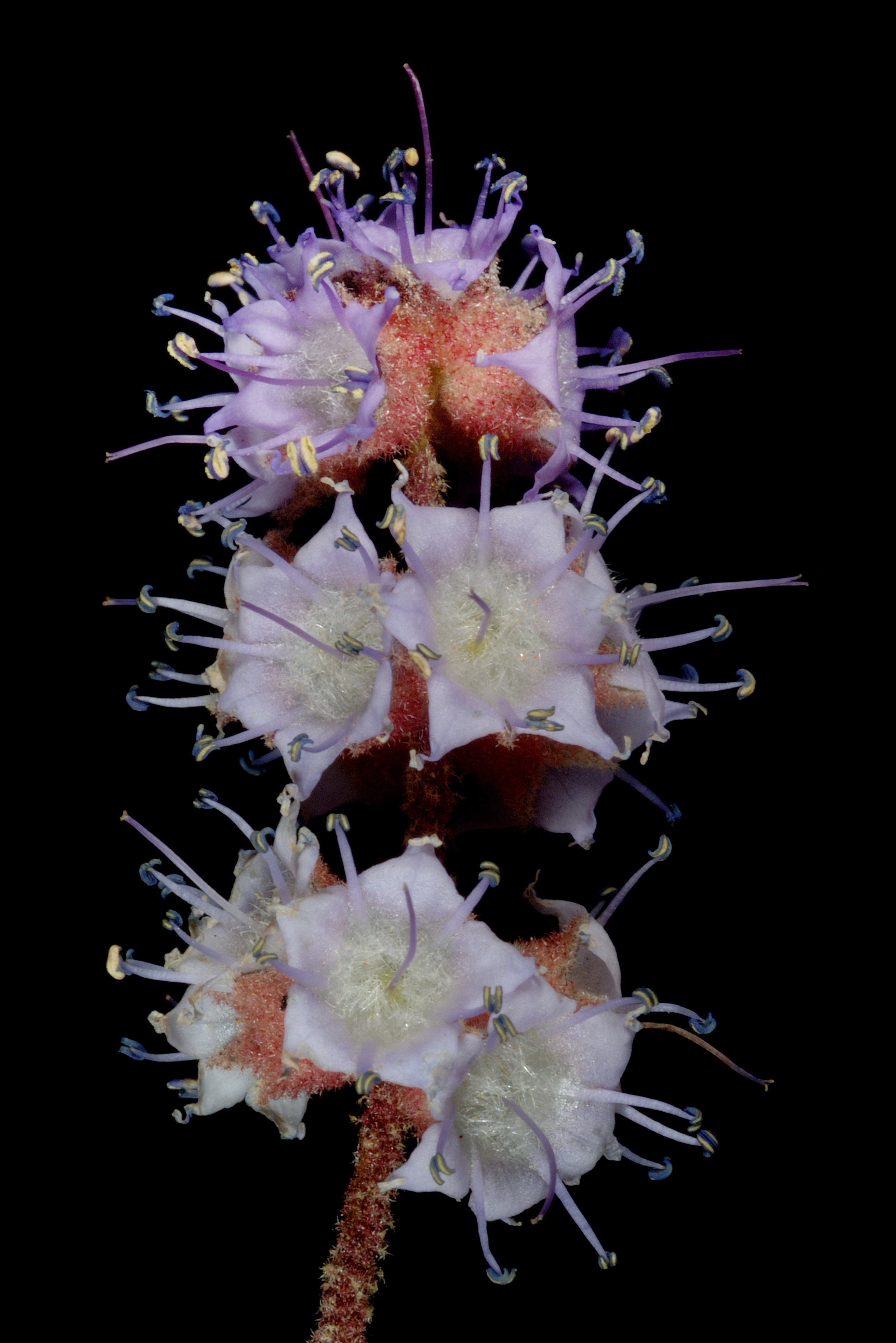 Newcastelia roseoazurea